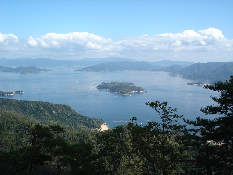 Blick vom Berg Misen nach Osten auf die Seto-Inlandsee mit der Insel Ōnasabi-jima